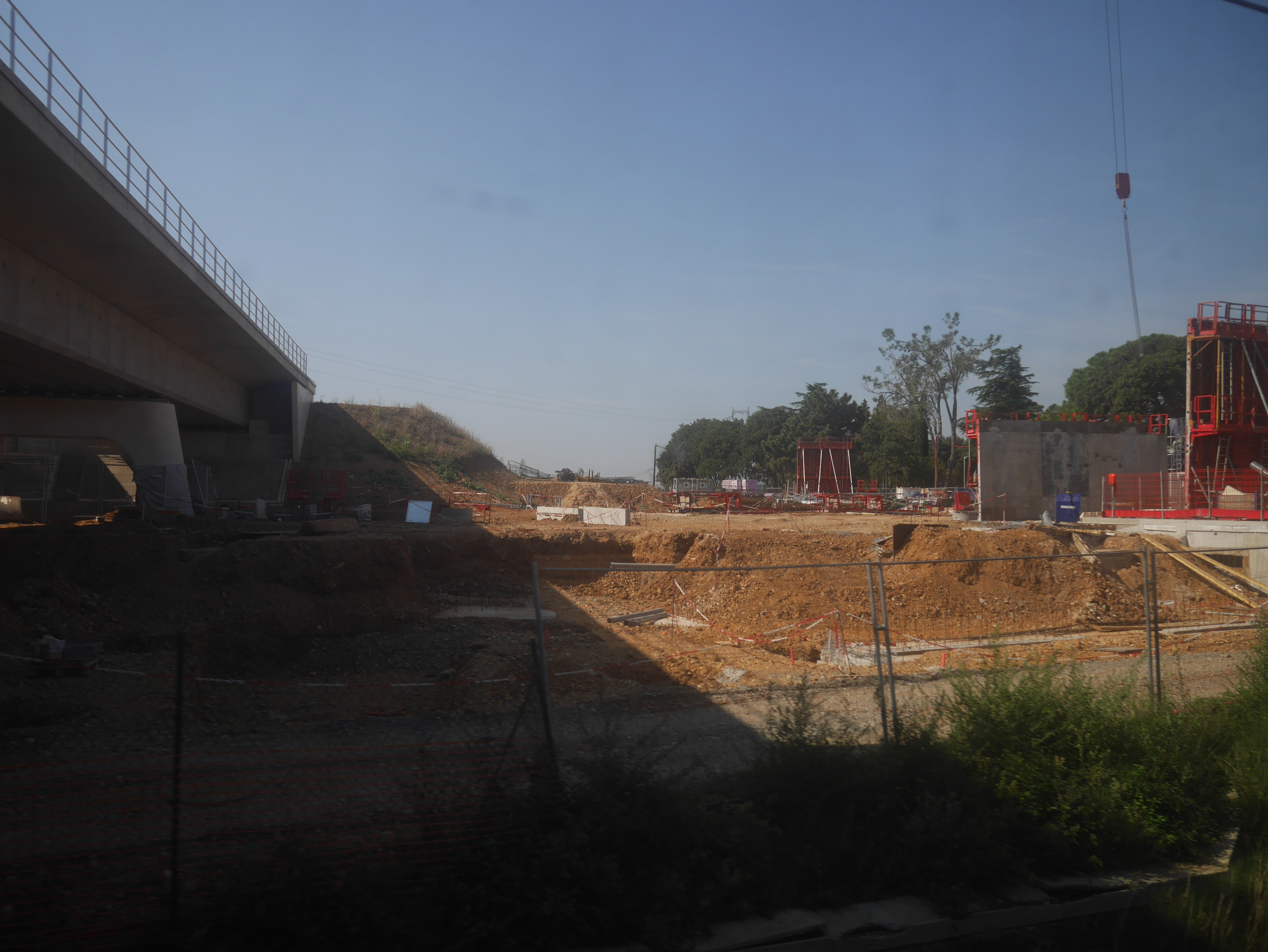 Chantier de la future gare de Nîmes - Manduel - Redessan en septembre 2018. Vu d'un train sur la ligne de Tarascon à Sète-Ville. Vue vers le sud-ouest.